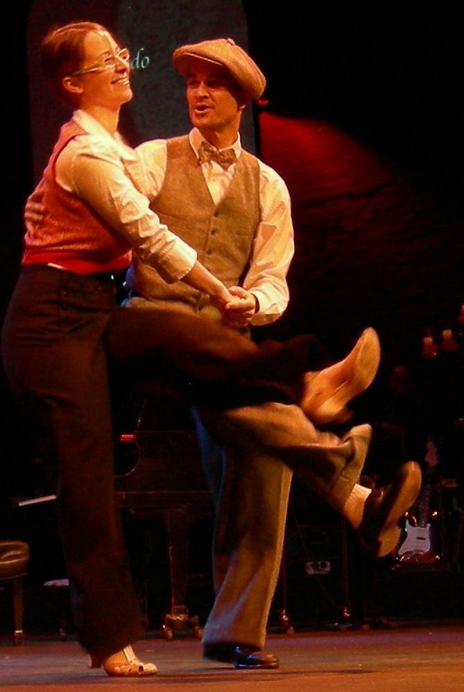 Pas charleston lors d'une danse swing ("Basic Charleston")